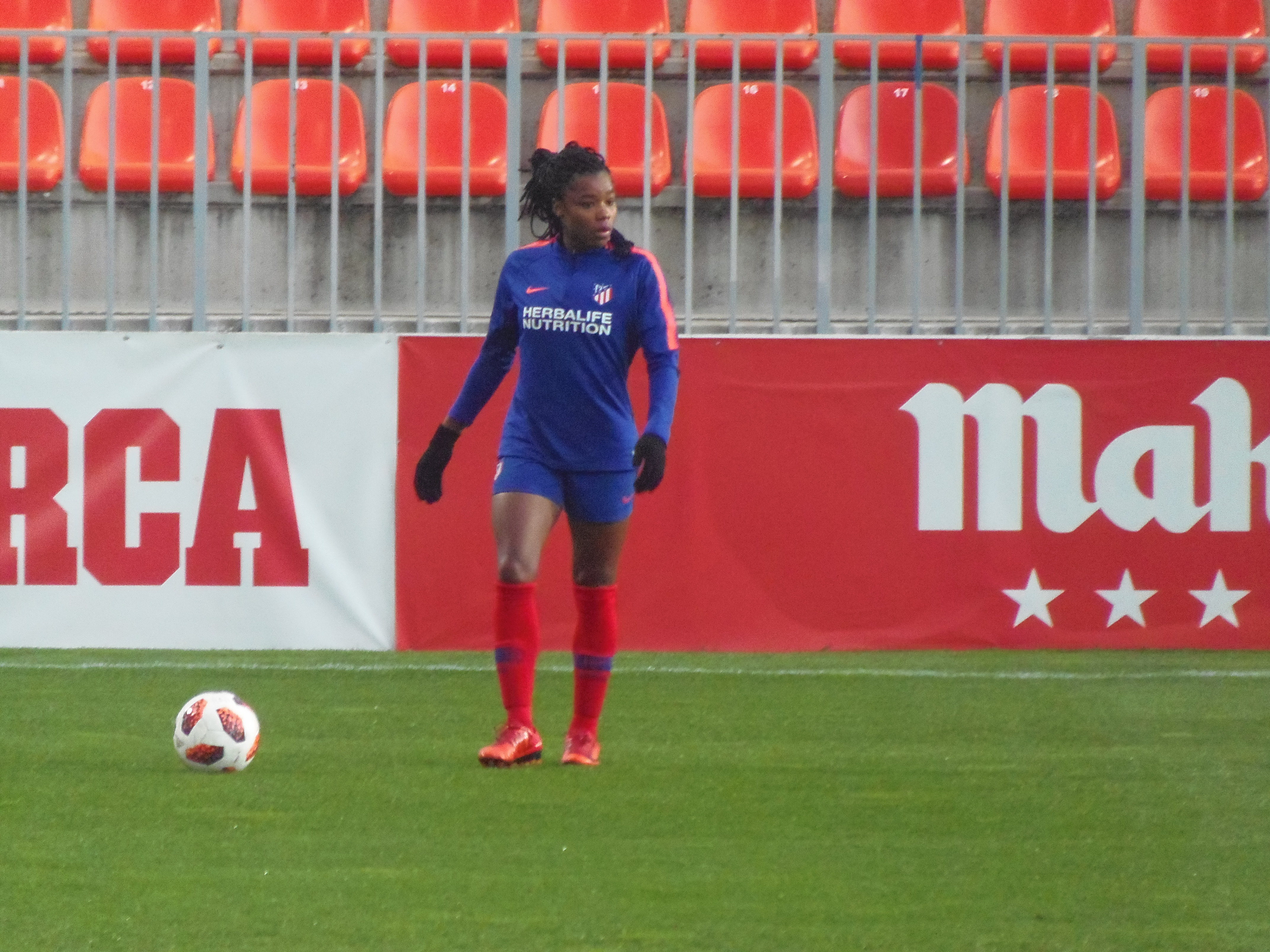 Ludmila en un calentamiento con el Atlético de Madrid